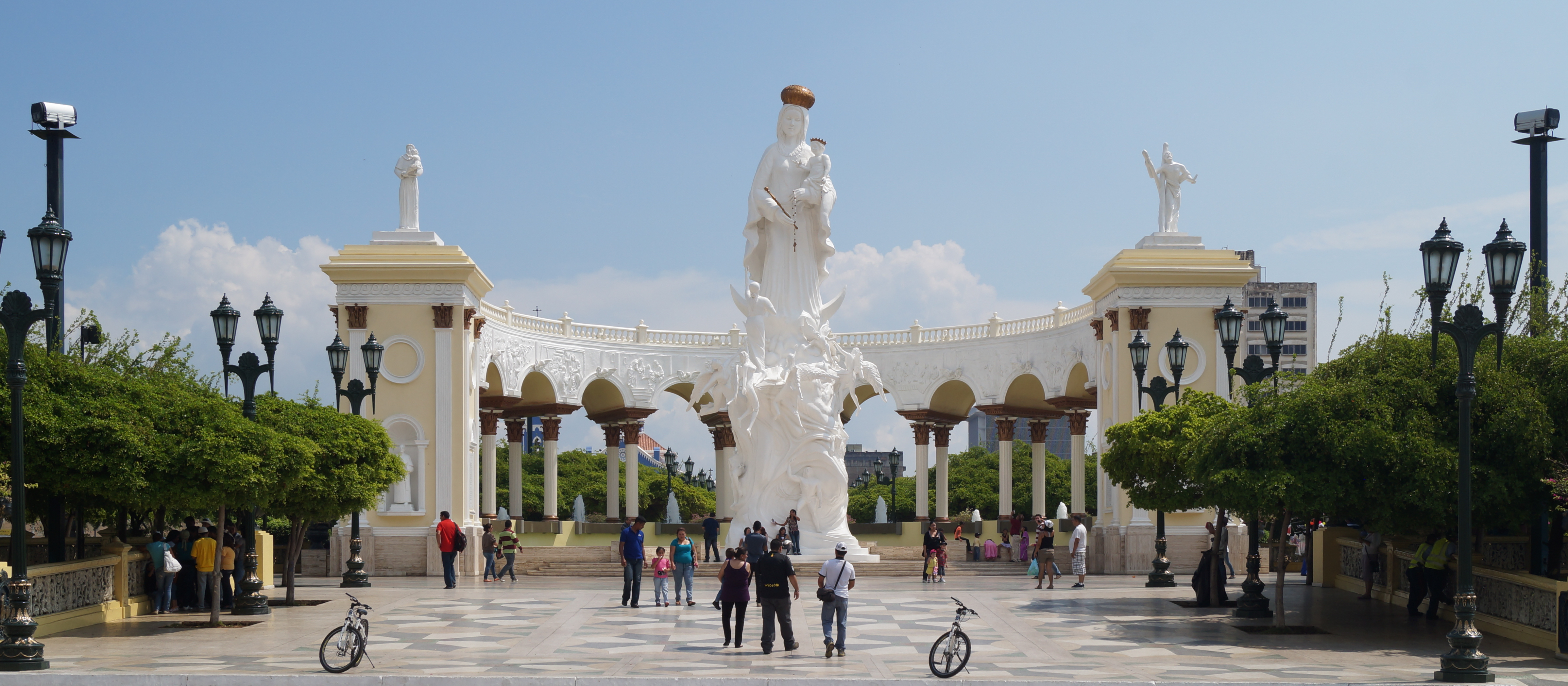 Plaza del Rosario de Nuestra Señora de La Chiquinquira